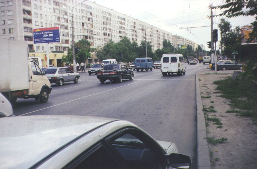 eo Nova distrikto de urbo Volgograd (2003). ru Новый район Волгограда (2003). La fonta bildo de cxi tiu bildo estas ankaux en mia propra retpagxaro [1] Mi, auxtoro de la bildo, permesas al cxiuj uzi gxin kun cxi tiuj kondicxoj